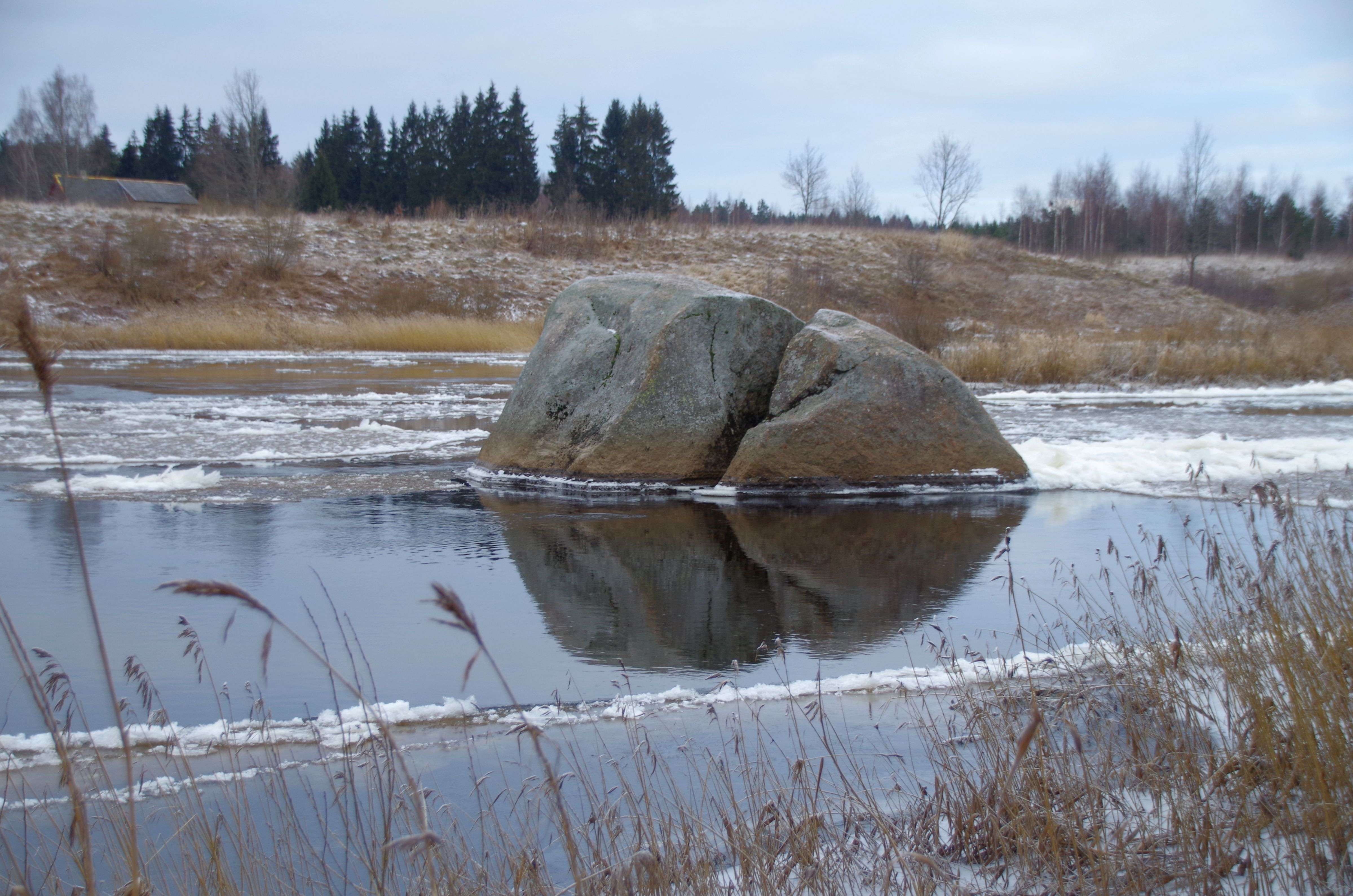 Võnnukivi ehk Kalevipoja Vestitasku kivi on hiidrahn Pärnu maakonnas Tori vallas.